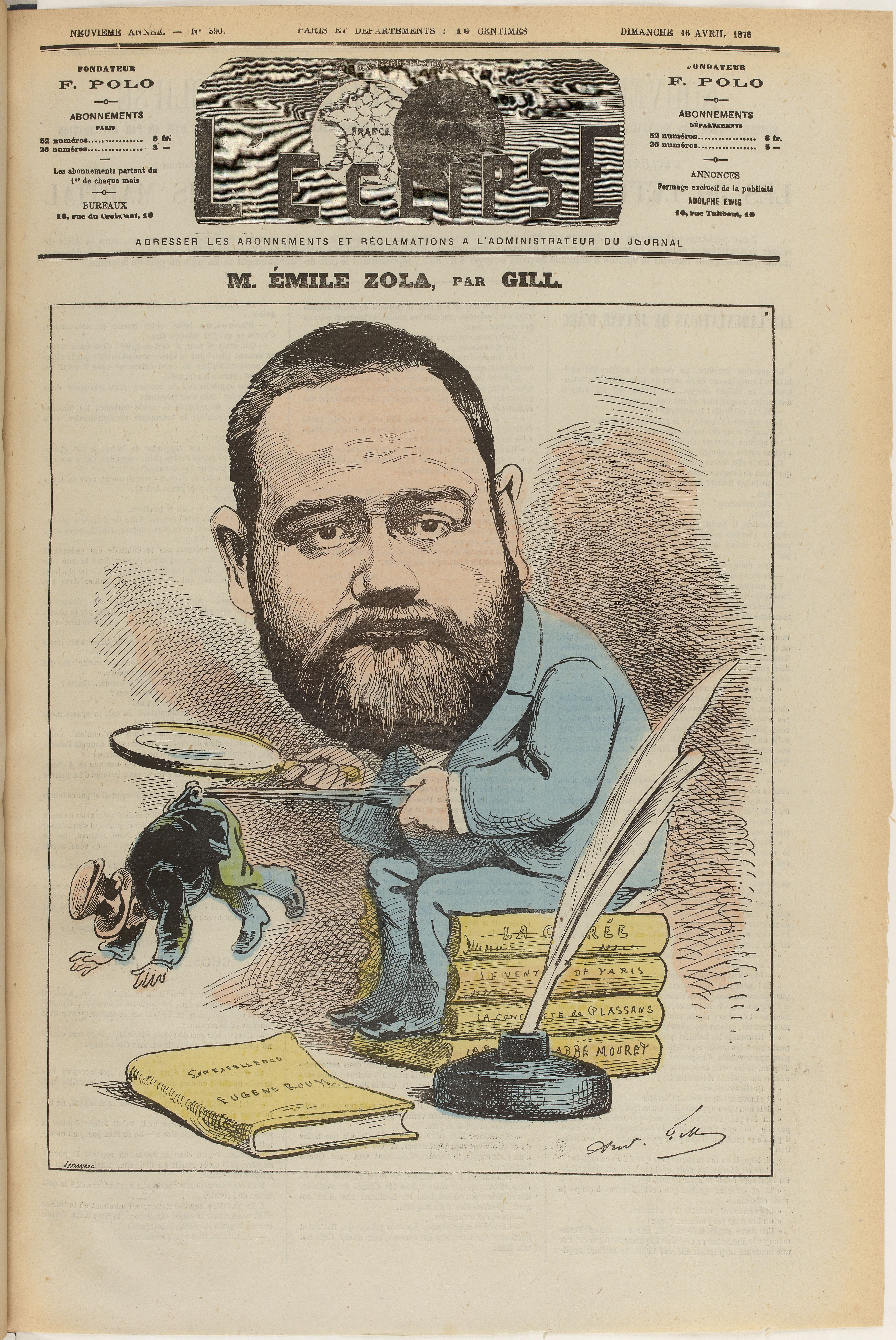 Caricature de Gill représantant Zola